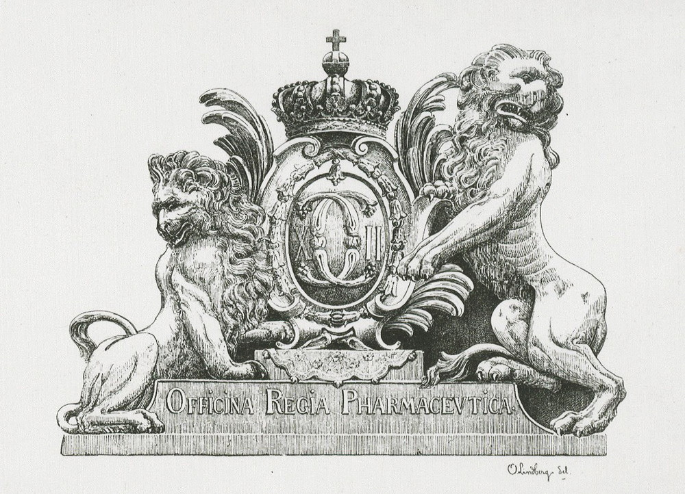 Skylt för "Apoteket Kronan", stenskulptur från 1700-talets början